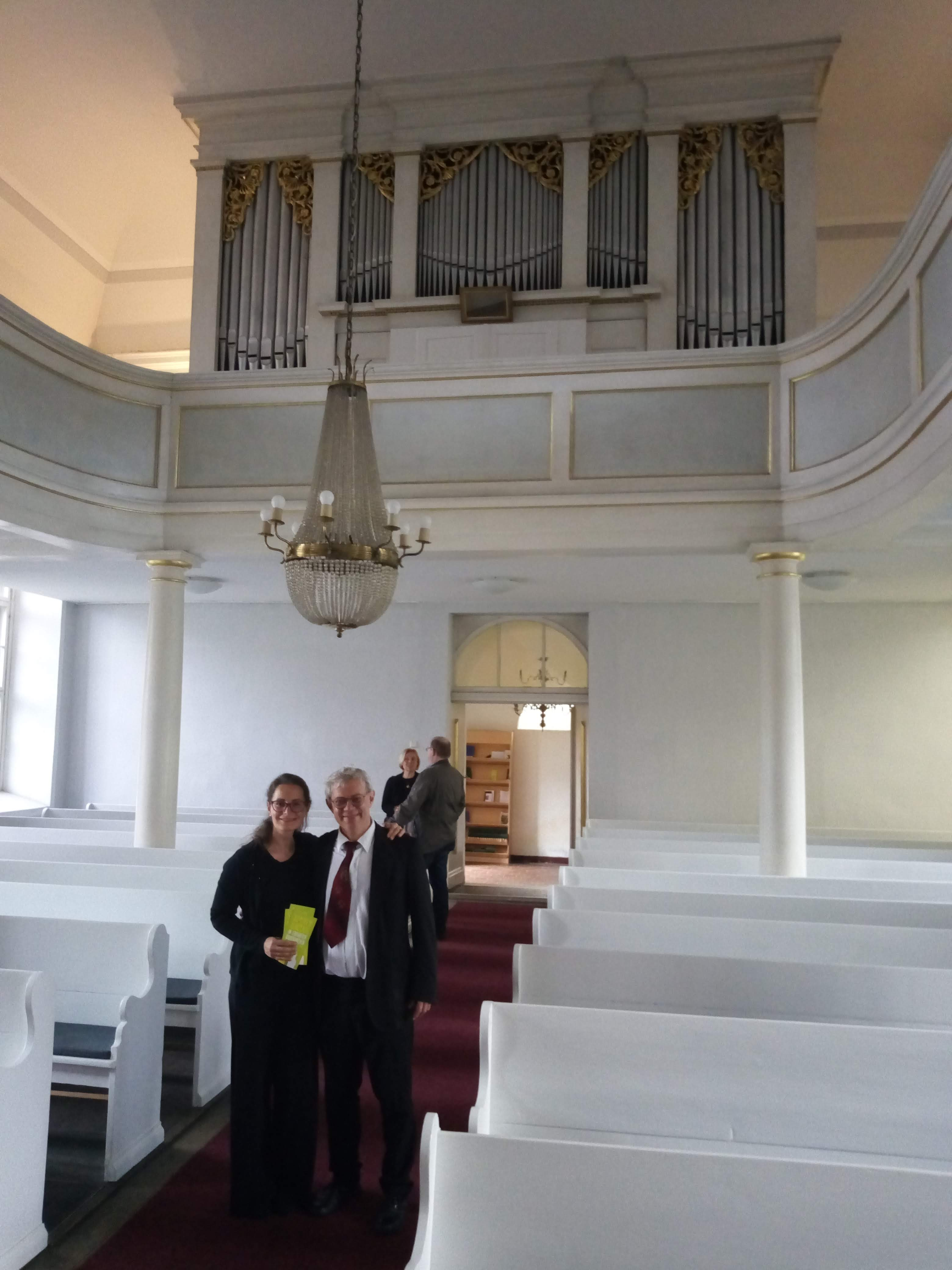 Martinikirche, Erfurt-Ilversgehofen, Orgelempore